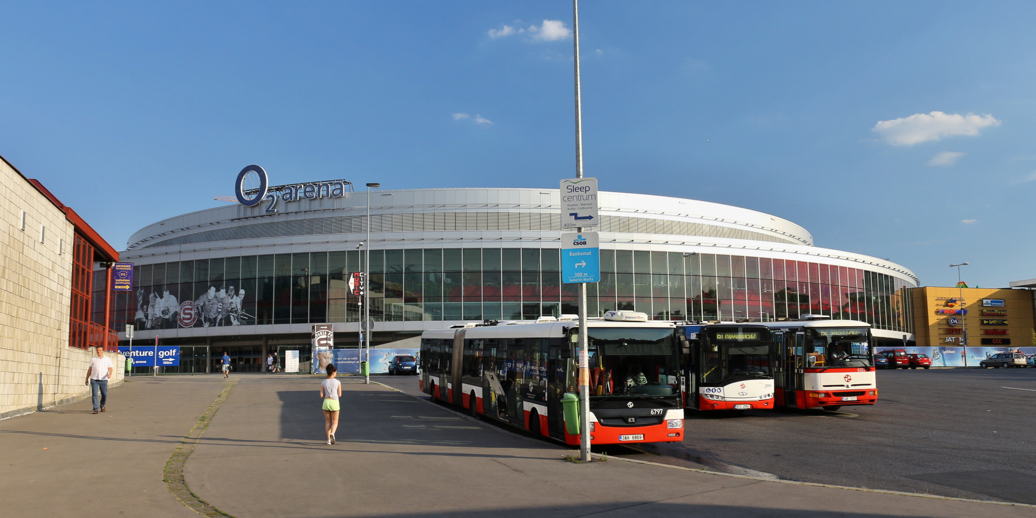 O2 Arena Praha-Libeň